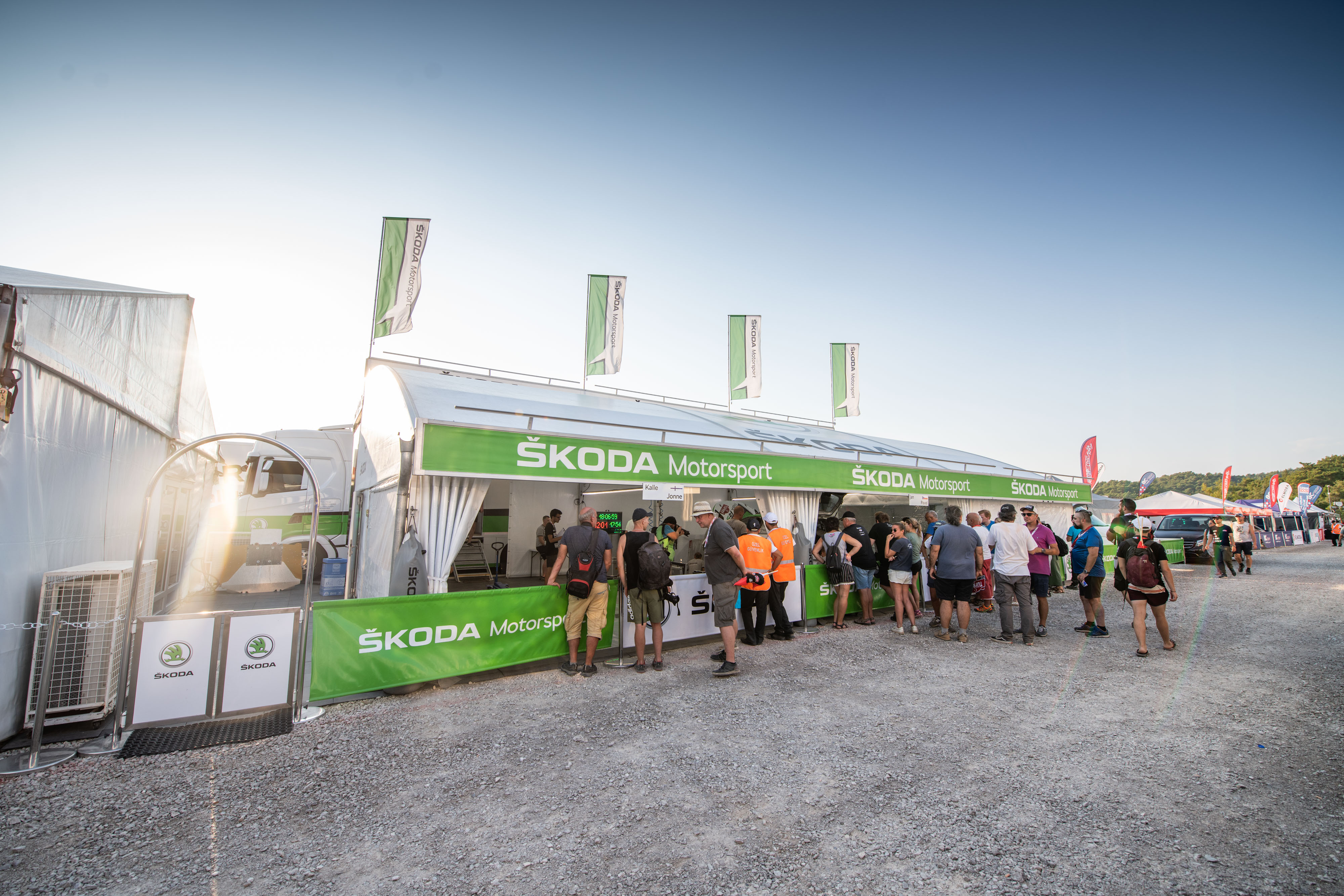 Servisní zázemí ŠKODA Motorsport